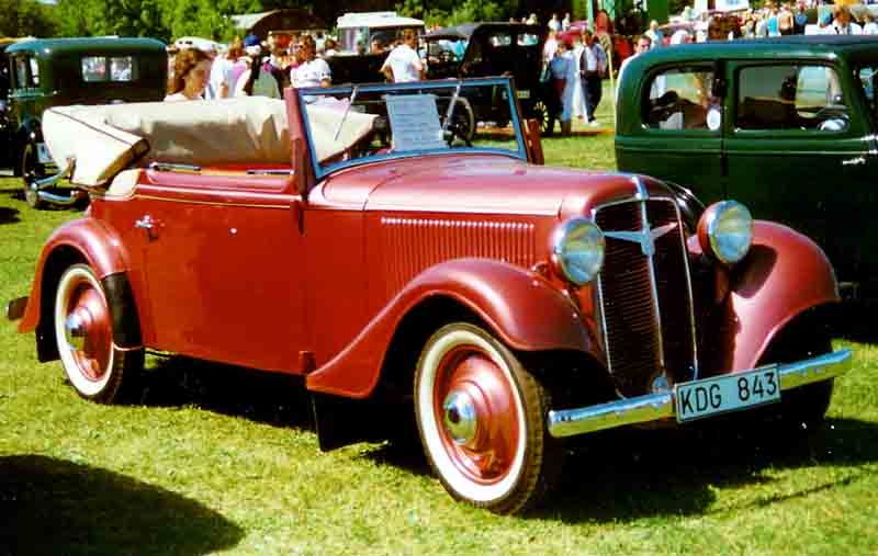 Adler Trumpf Cabriolet 1935